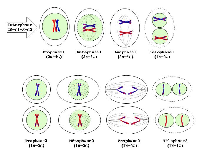 Description: Dessin montrant les différentes étapes de la méiose cellulaire Source: dessin original Auteur: Michel Hamels